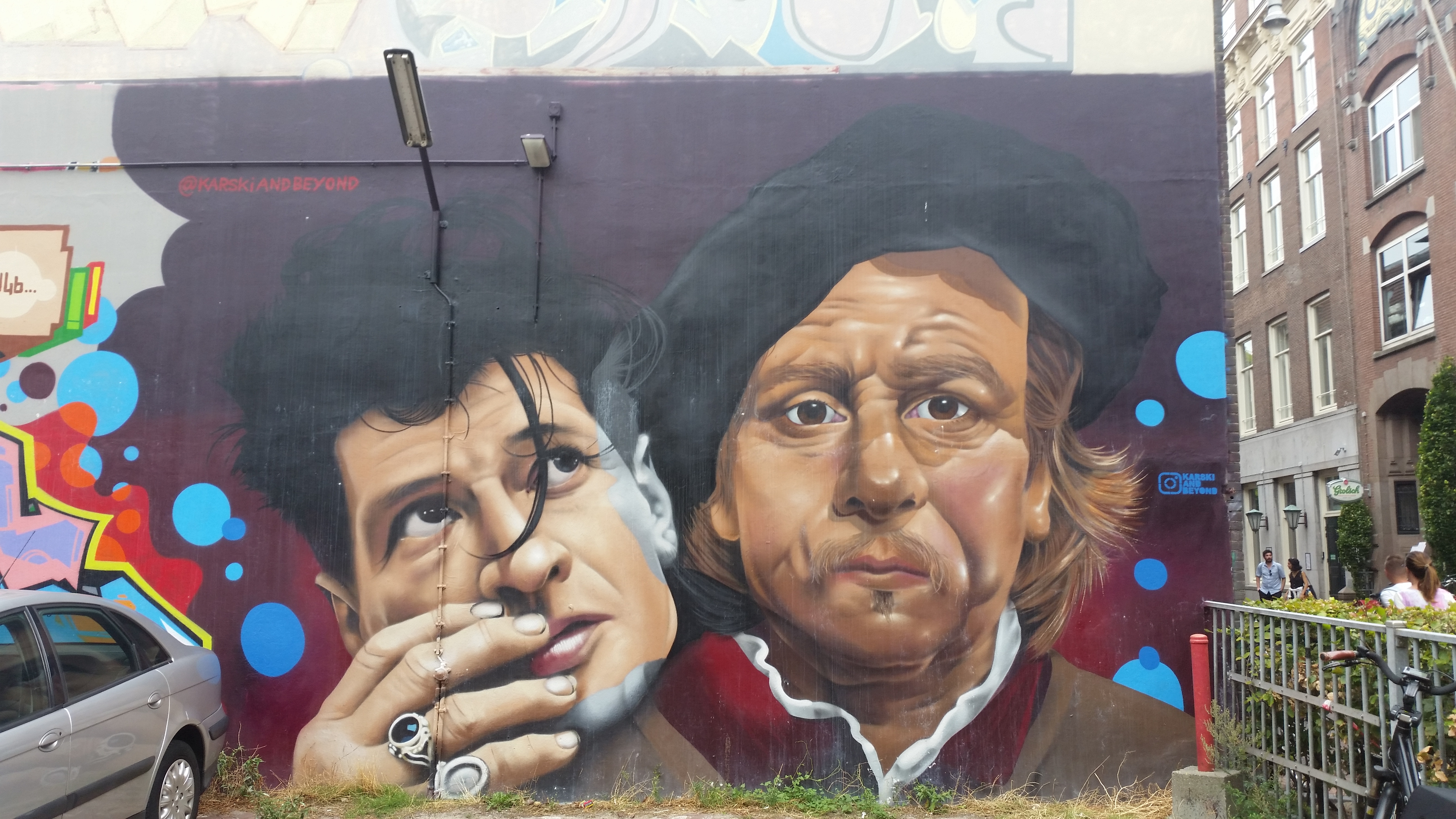 Mural met Herman Brood en Rembrandt van Rijn op een parkeerplaats aan de Nieuwe Doelenstraat